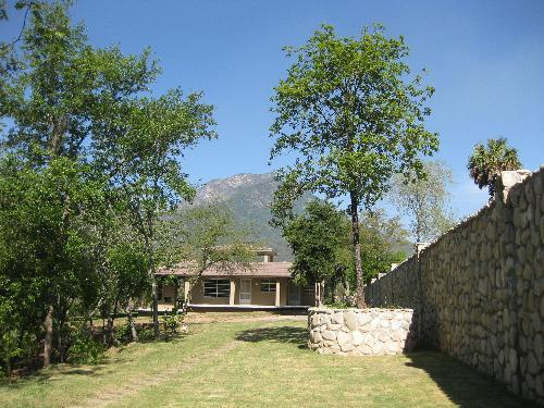 Un rancho en Montemorelos, Nuevo León, México